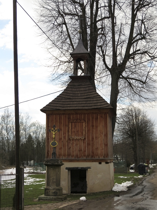 Kaple, Levínské Petrovice.